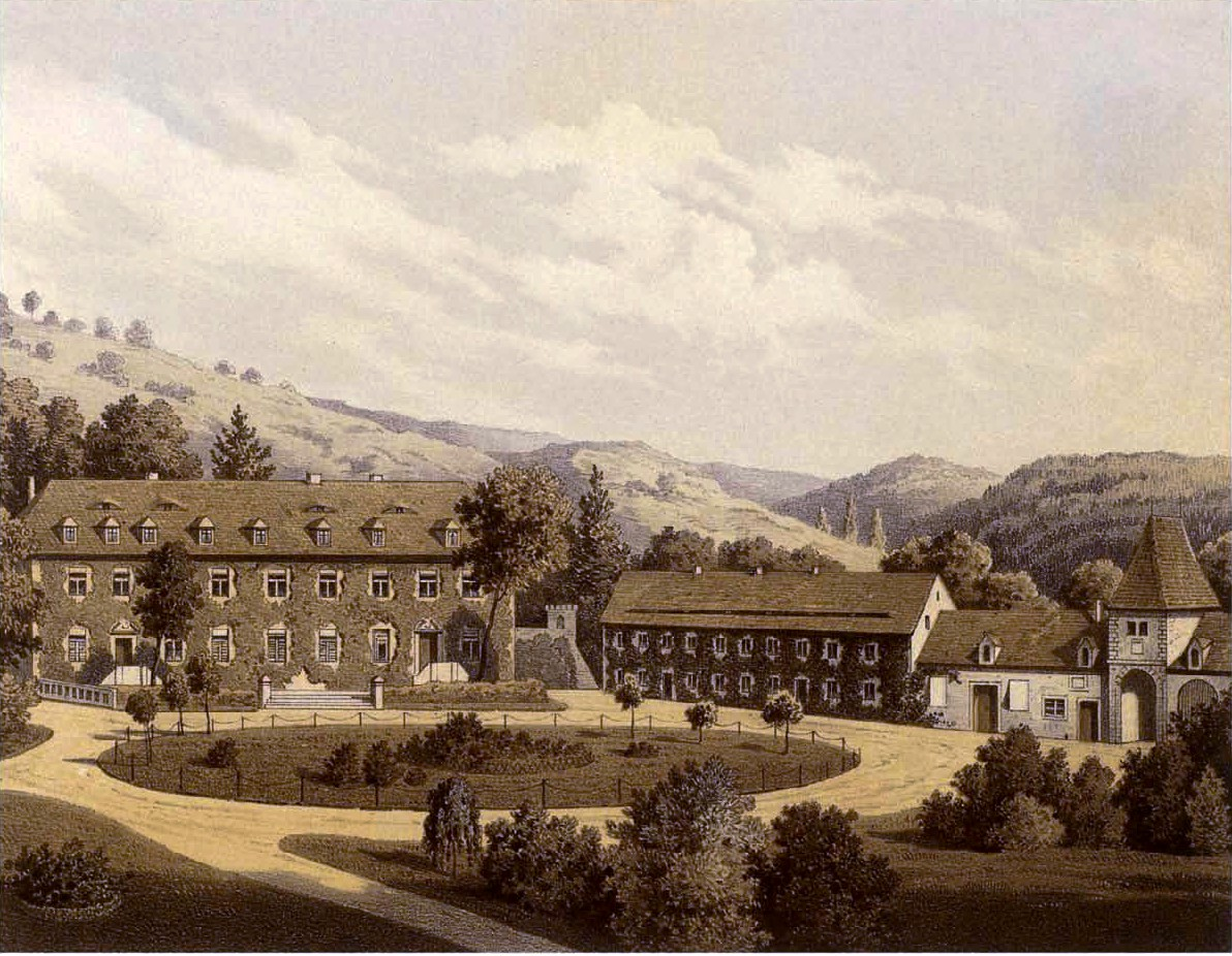 Rittergut Zingst, Kreis Querfurt Nach ein. Original-Aufnahme von H. Rettig ausgef. v. Theodor Albert, gedr. b. Winckelmann u. Söhne. Verlag von Alexander Duncker, Königl. Hofbuchhändler in Berlin